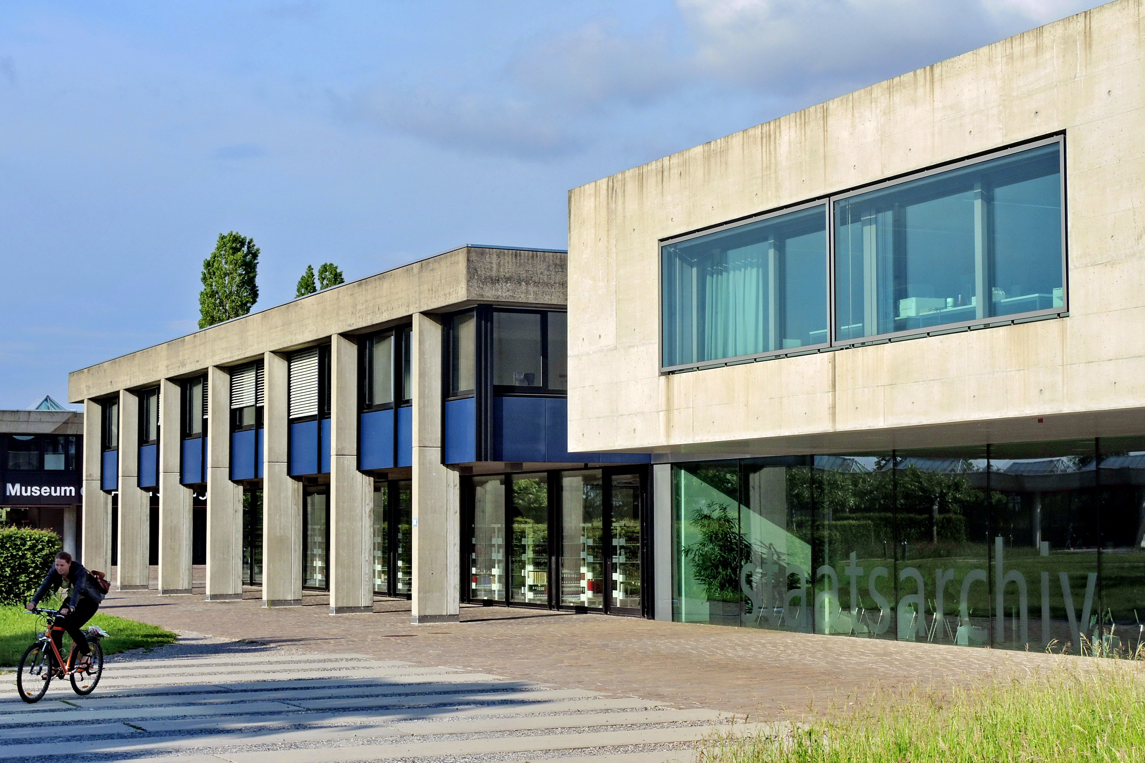 Staatsarchiv des Kantons Zürich, Irchelpark in Zürich (Switzerland)